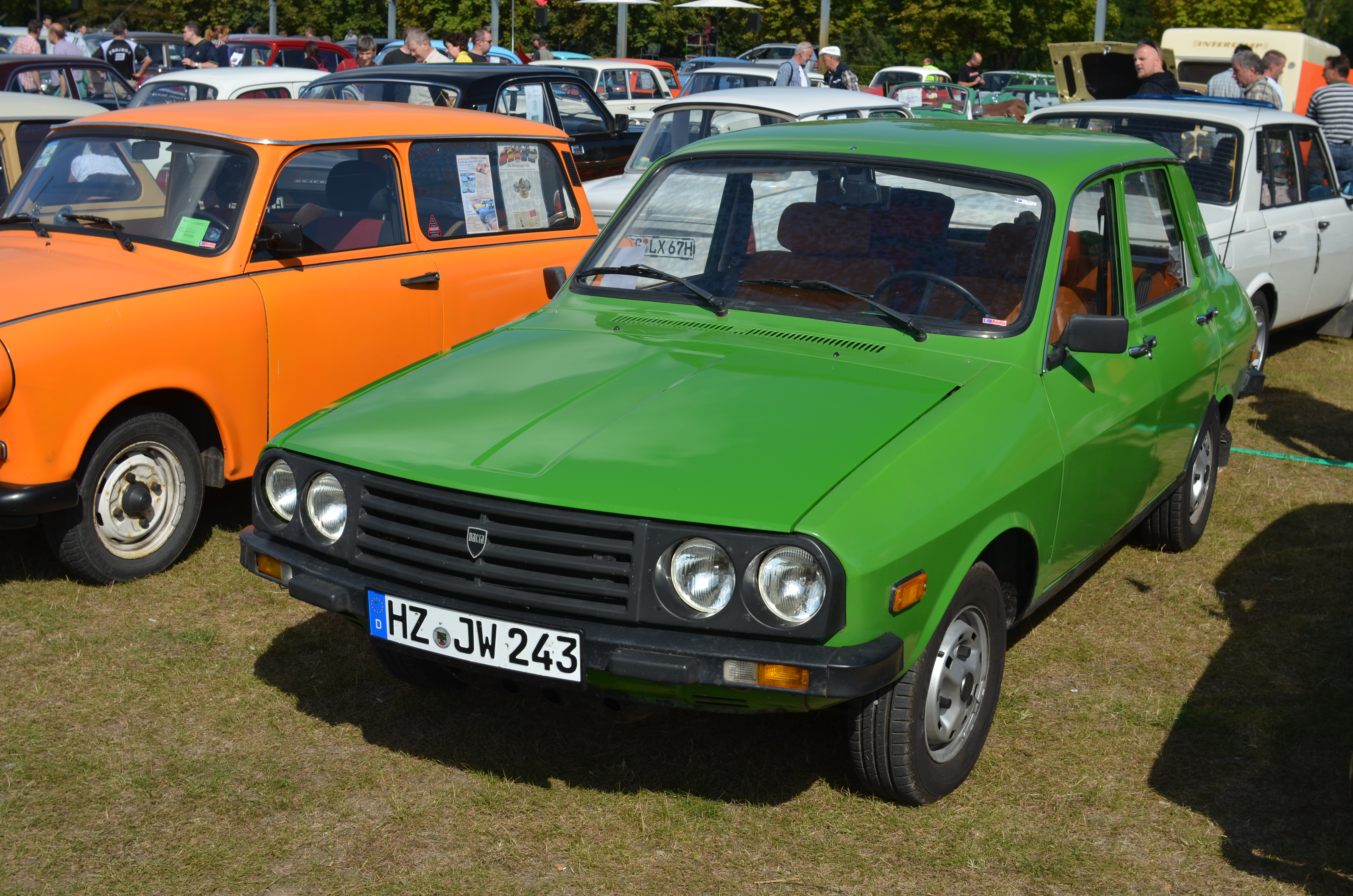 Dacia